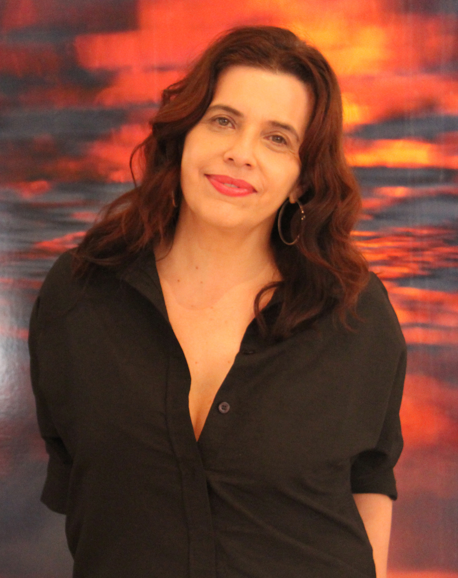 Foto da artista Niura Bellavinha